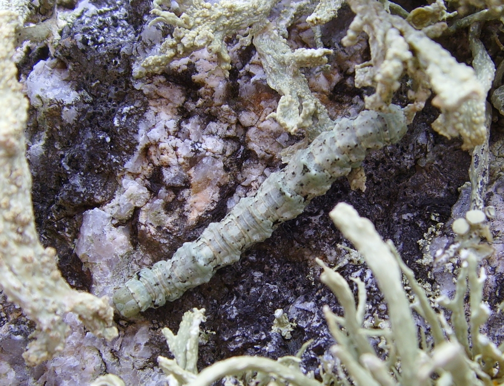 Cleorodes lichenaria (Geometridae), chenille, rochers couverts de Ramalina, Karreg ar Skeul, Goulien, Finistère, Bretagne, France